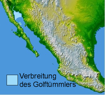 Karte des Golfes von Kalifornien, Verbreitungsgebiet des Golftümmlers hellblau gekennzeichnet